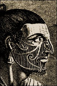 gravure of a maori man tatooed